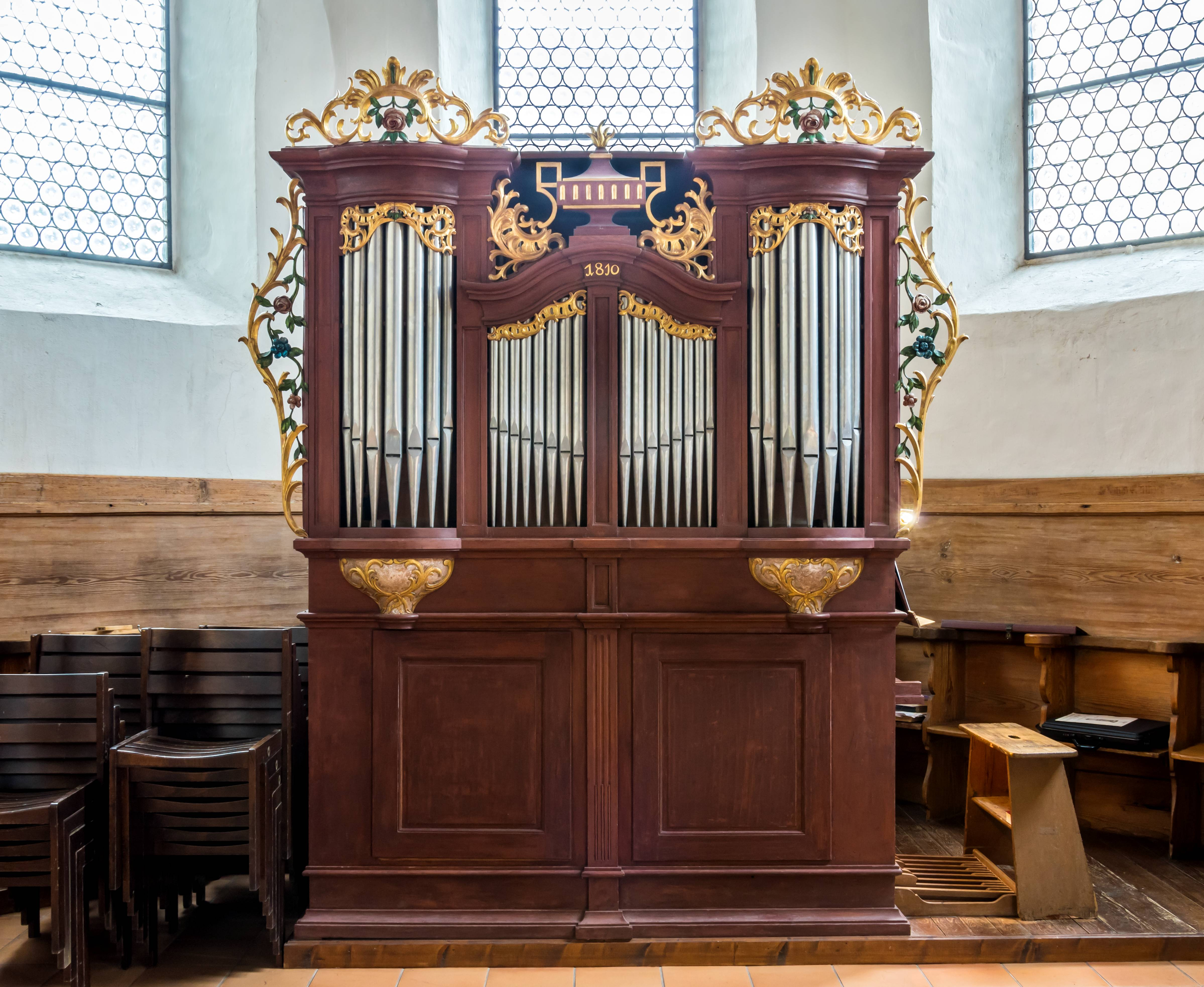 Bilder aus der evangelischen Kirche in Fischingen Die Orgel von Xaver Bernauer aus dem Jahre 1810 Vorderansicht